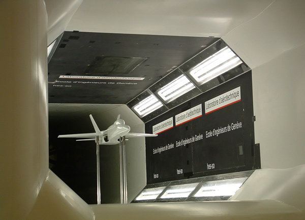 Essais aérodynamiques dans la grande soufflerie du CMEFE Genève